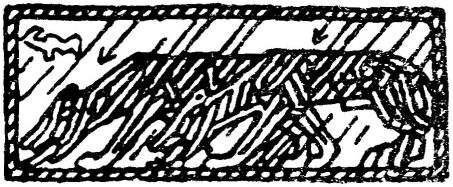 Gerhard Munthe: Illustration for Eiriksønnenes saga. Snorre 1899-edition. vignett 2